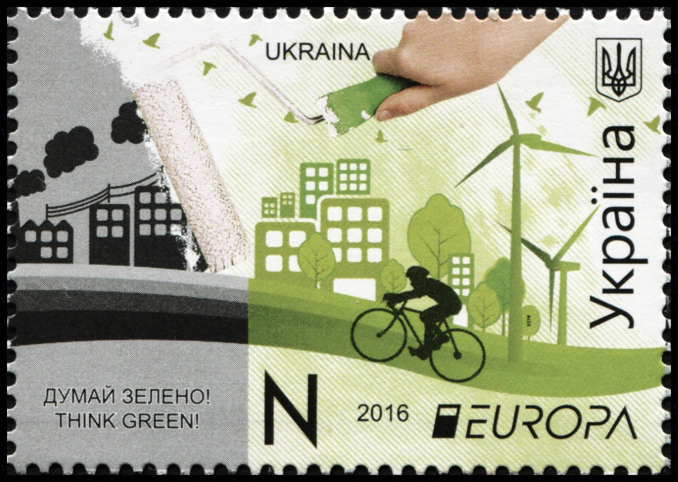 Марка України «Думай зелено! Think green!» EUROPA